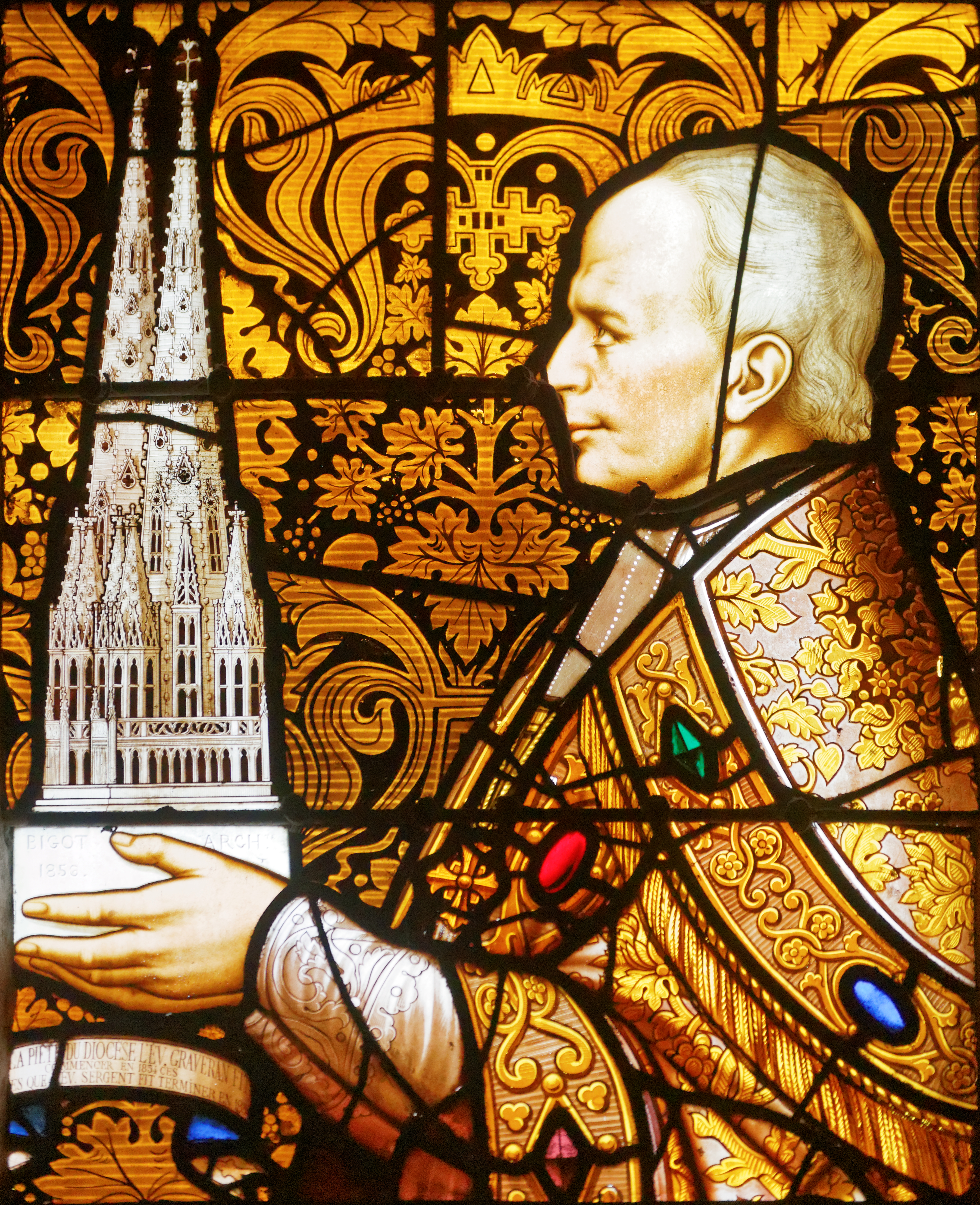 Détail des vitraux de la cathédrale Saint-Corentin de Quimper.